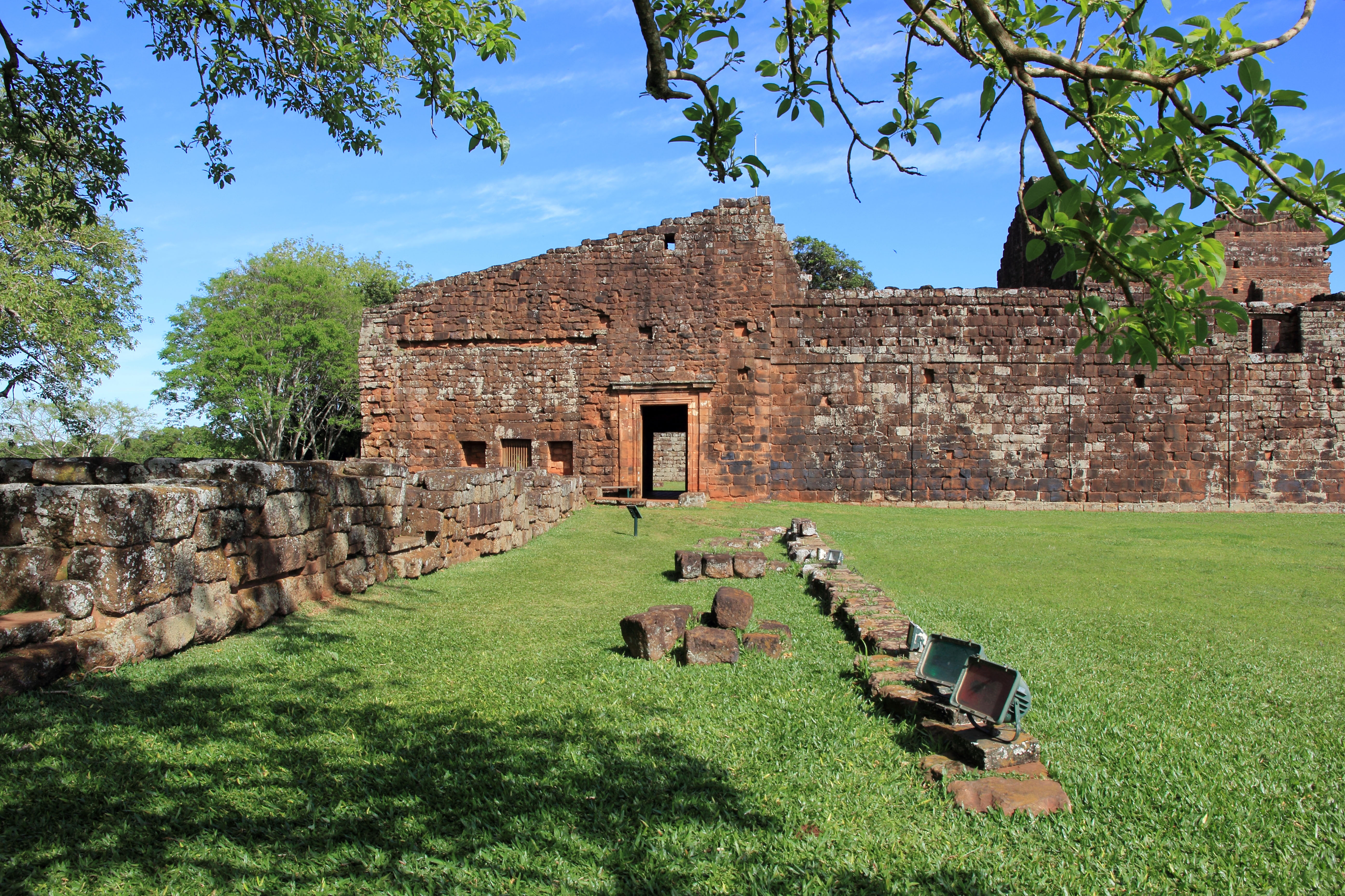 Sítio Arqueológico de São Miguel Arcanjo em São Miguel das Missões, RS.